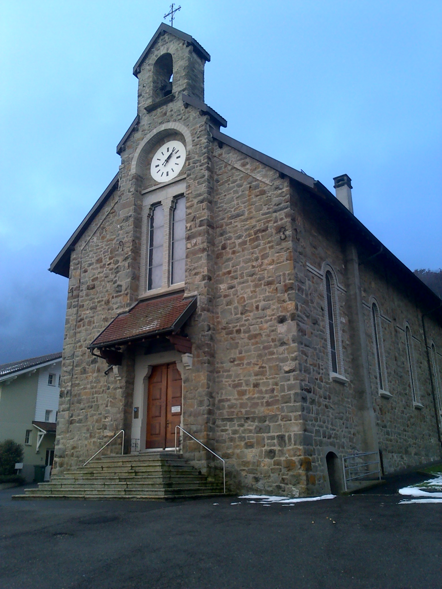 Eglise Bouveret (Valais, Suisse)